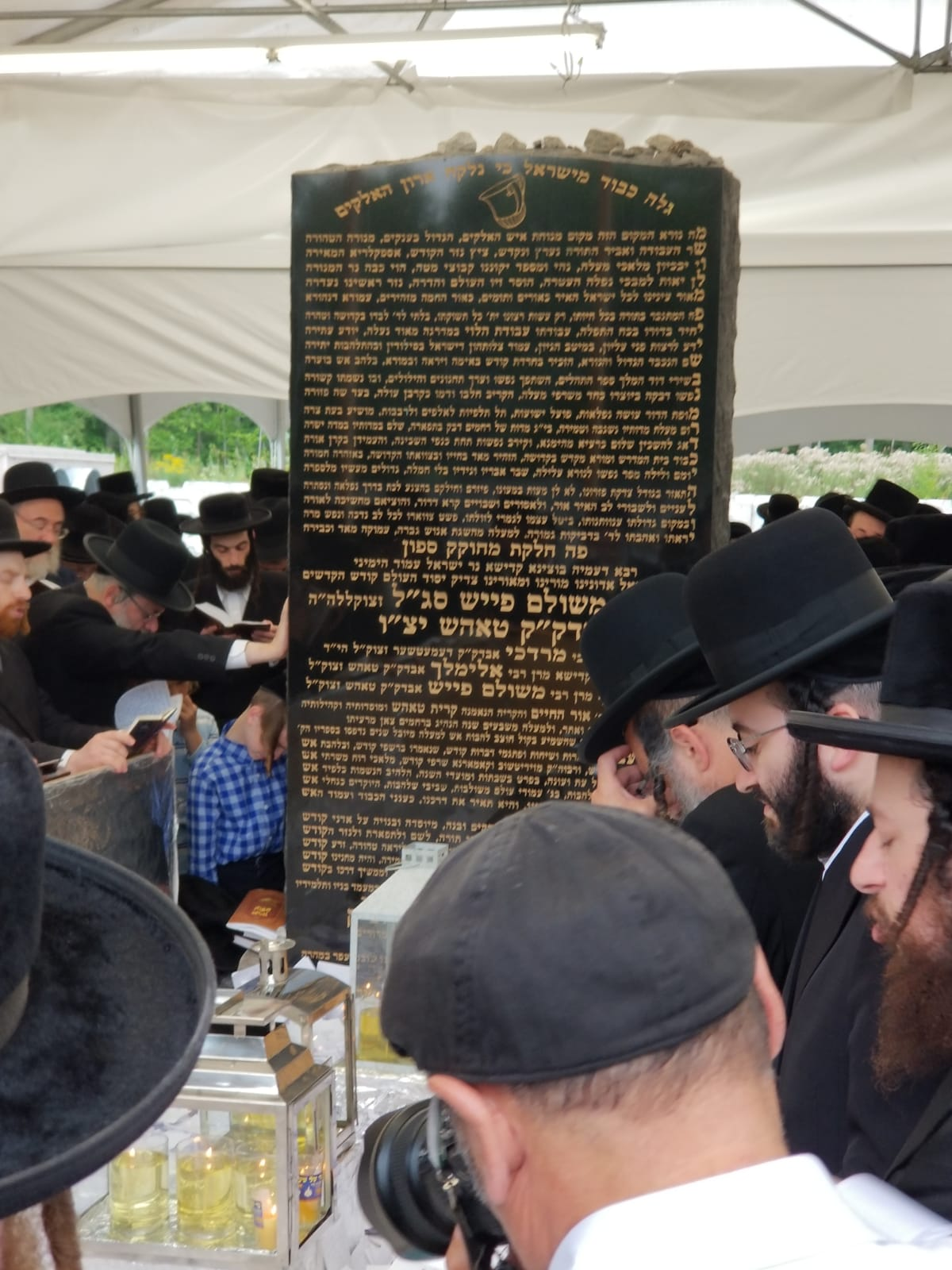 מתפללים על קבר האדמו"ר רבי משולם פייש זצ"ל